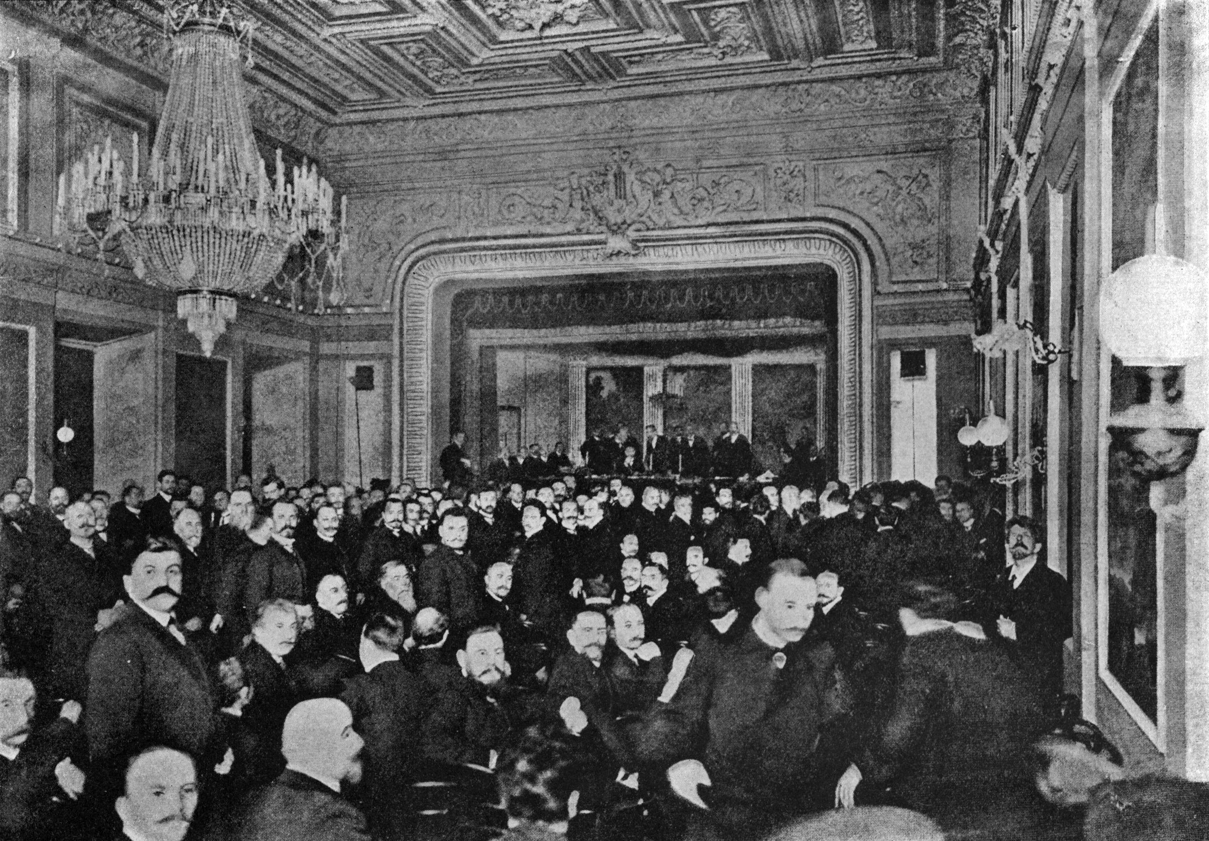 1-й всероссийский съезд торгово-промышленной партии в Охотничьем клубе в 1906 году, присоединившейся впоследствии к "октябристам"